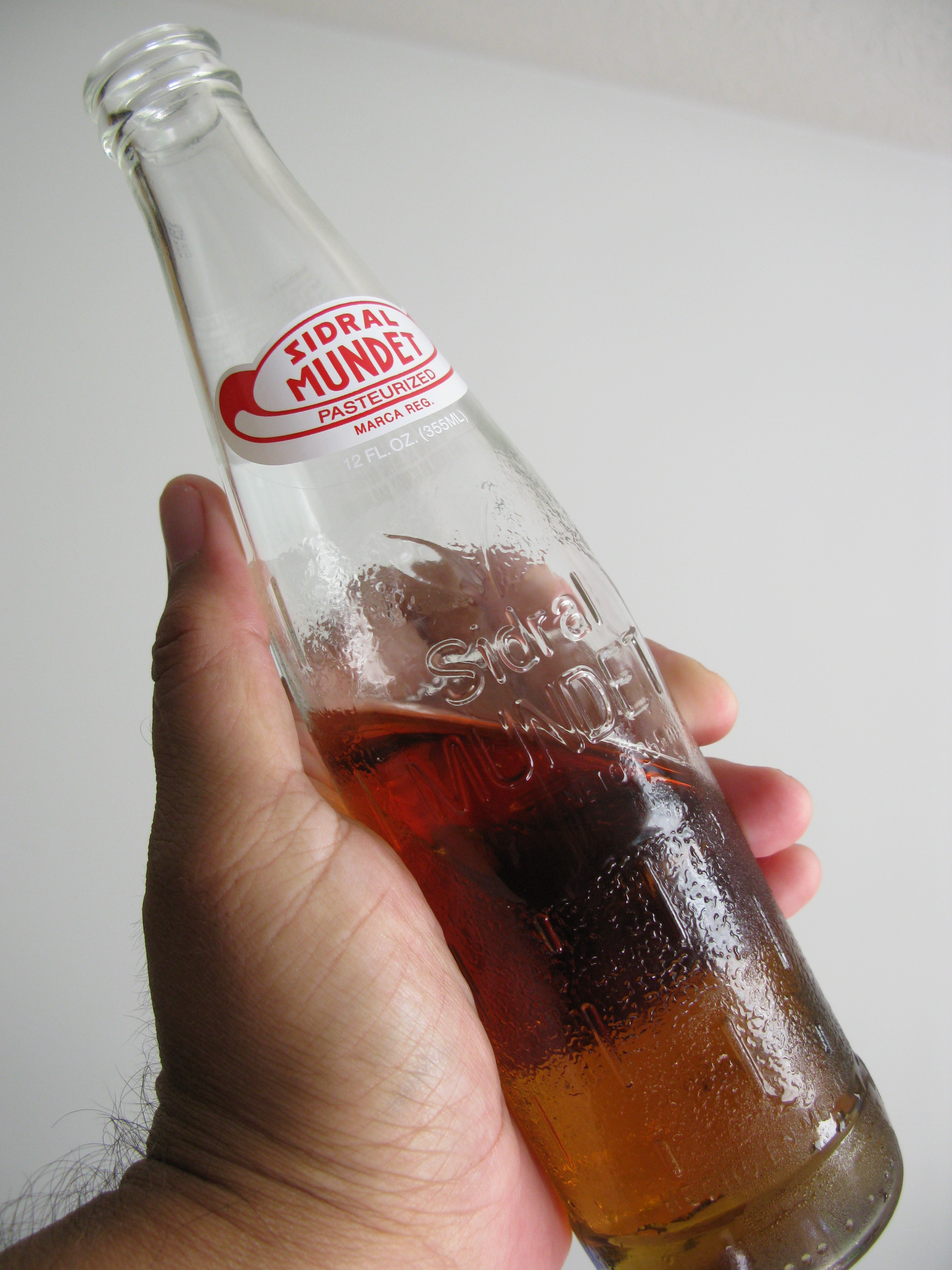 apple soda - hecho en mexico